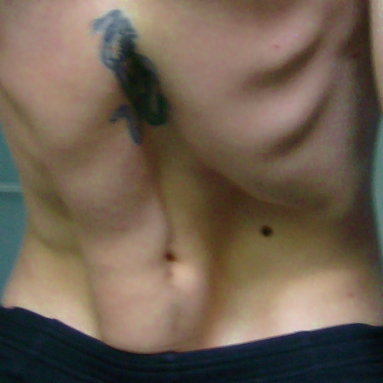 Nauli